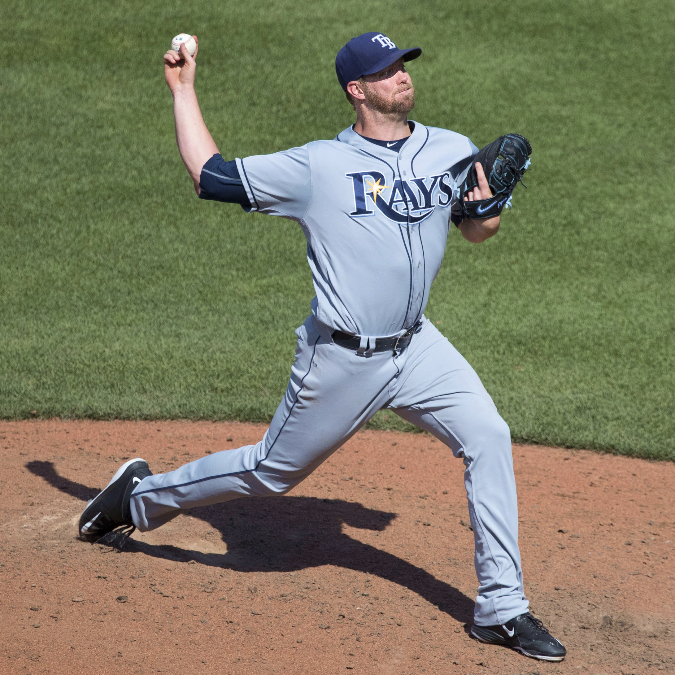 Ryan Webb